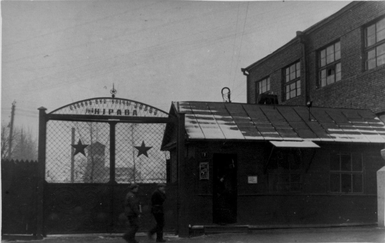 Беларуская (тарашкевіца): Менск (Miensk), Кашары (Kašary). Кашарскі станкабудаўнічы завод